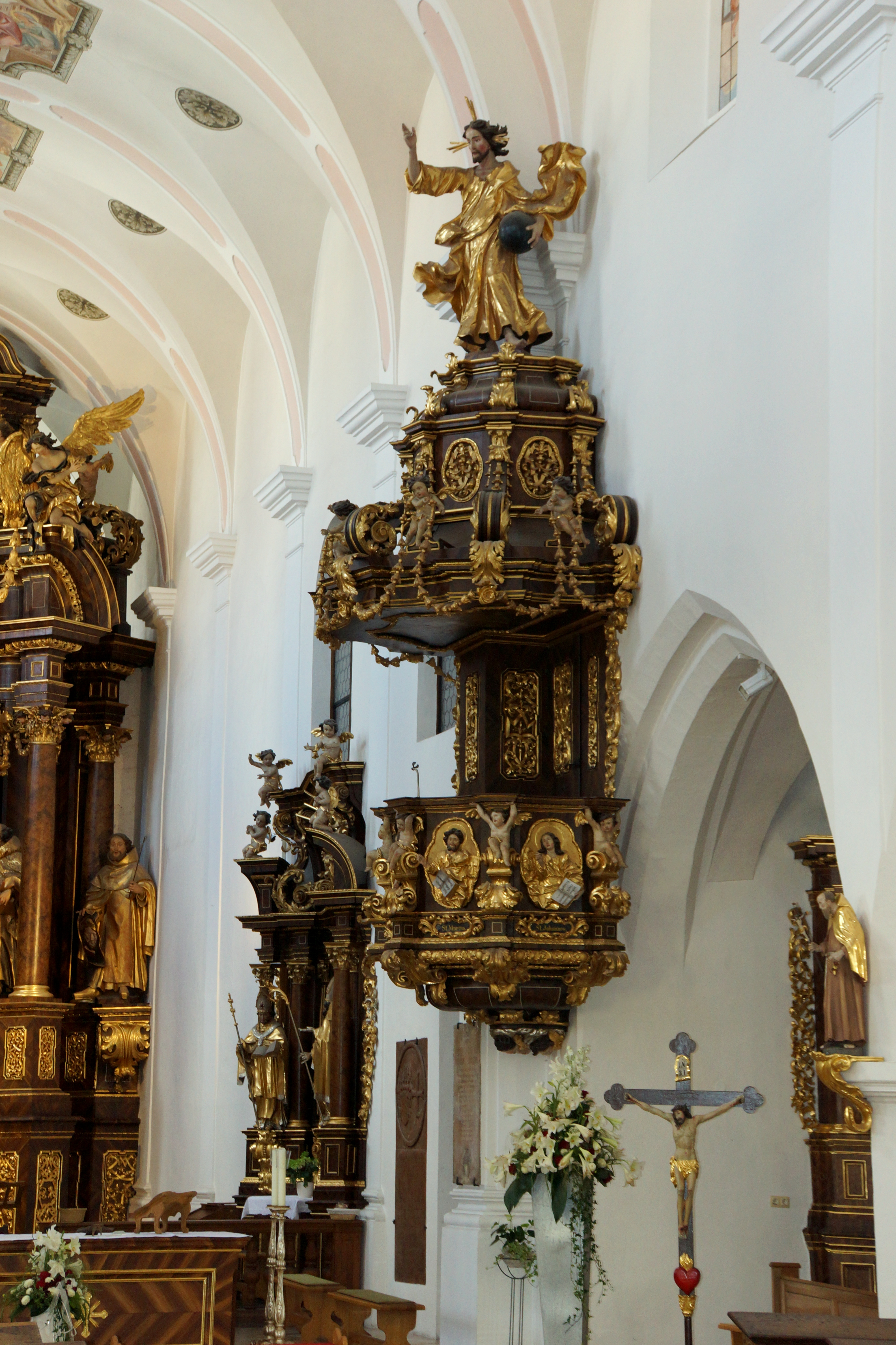 Die Klosterkirche des ehemaligen Karmelitenklosters in Abensberg